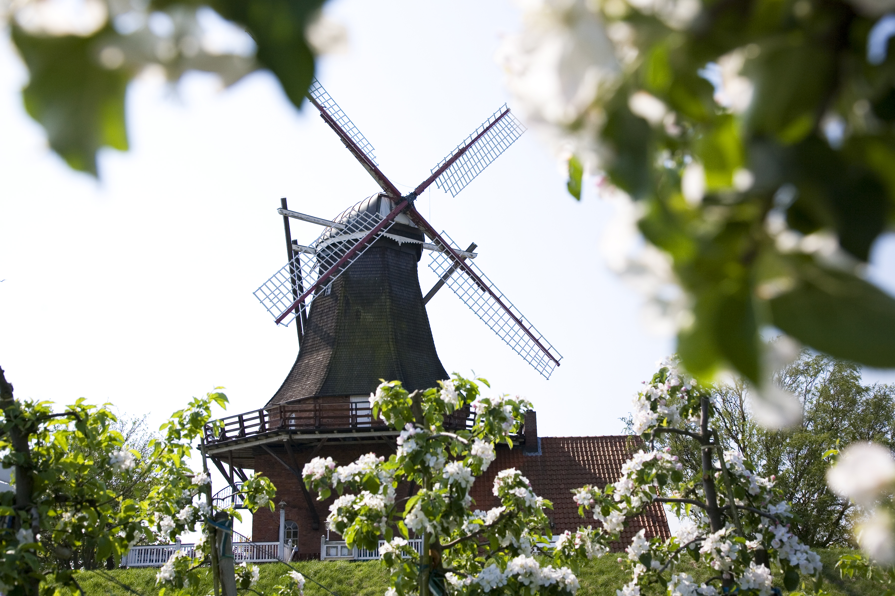 Die Mühle in der Apfelblüte